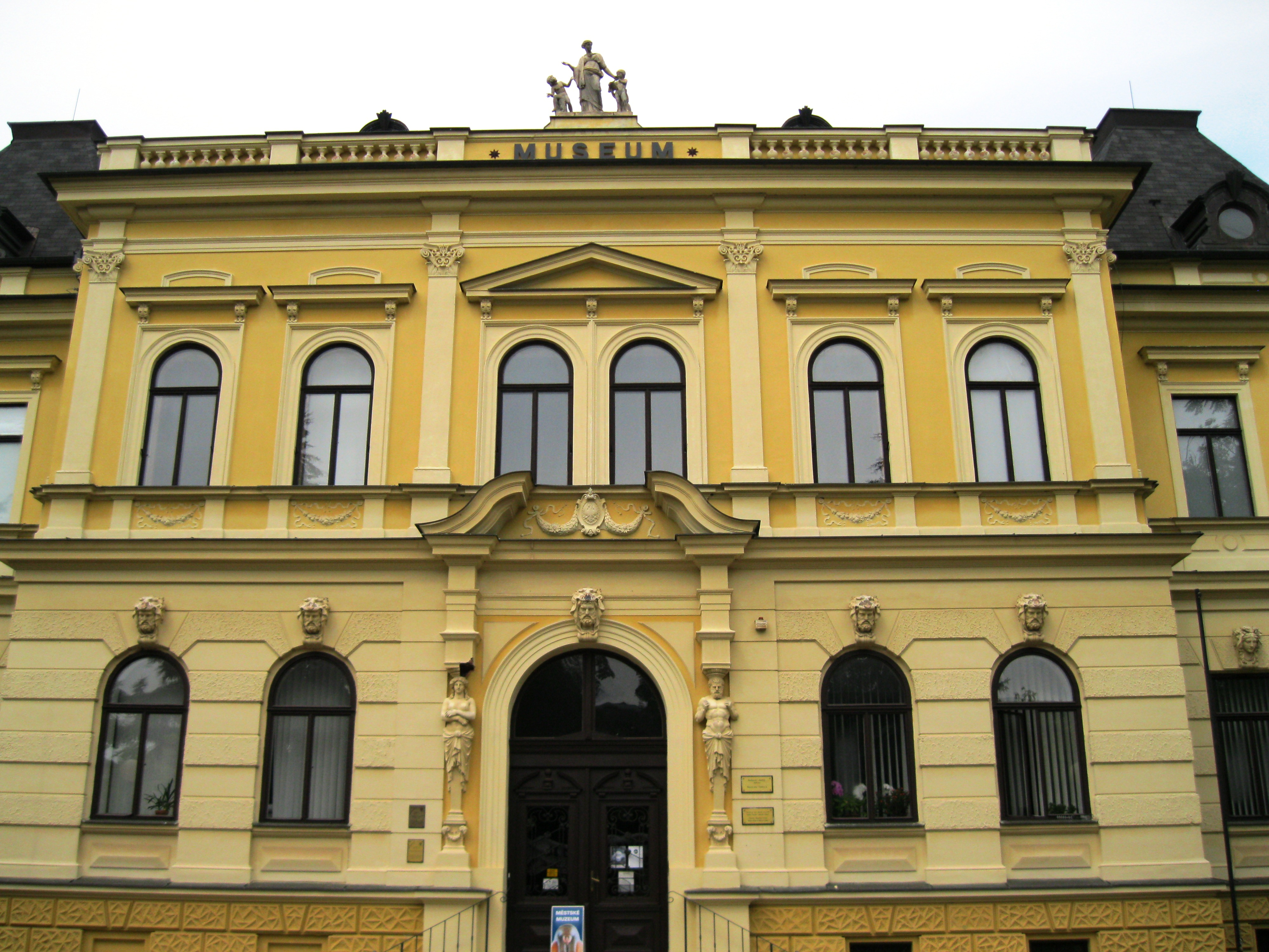 Muzeum (Moravská Třebová)